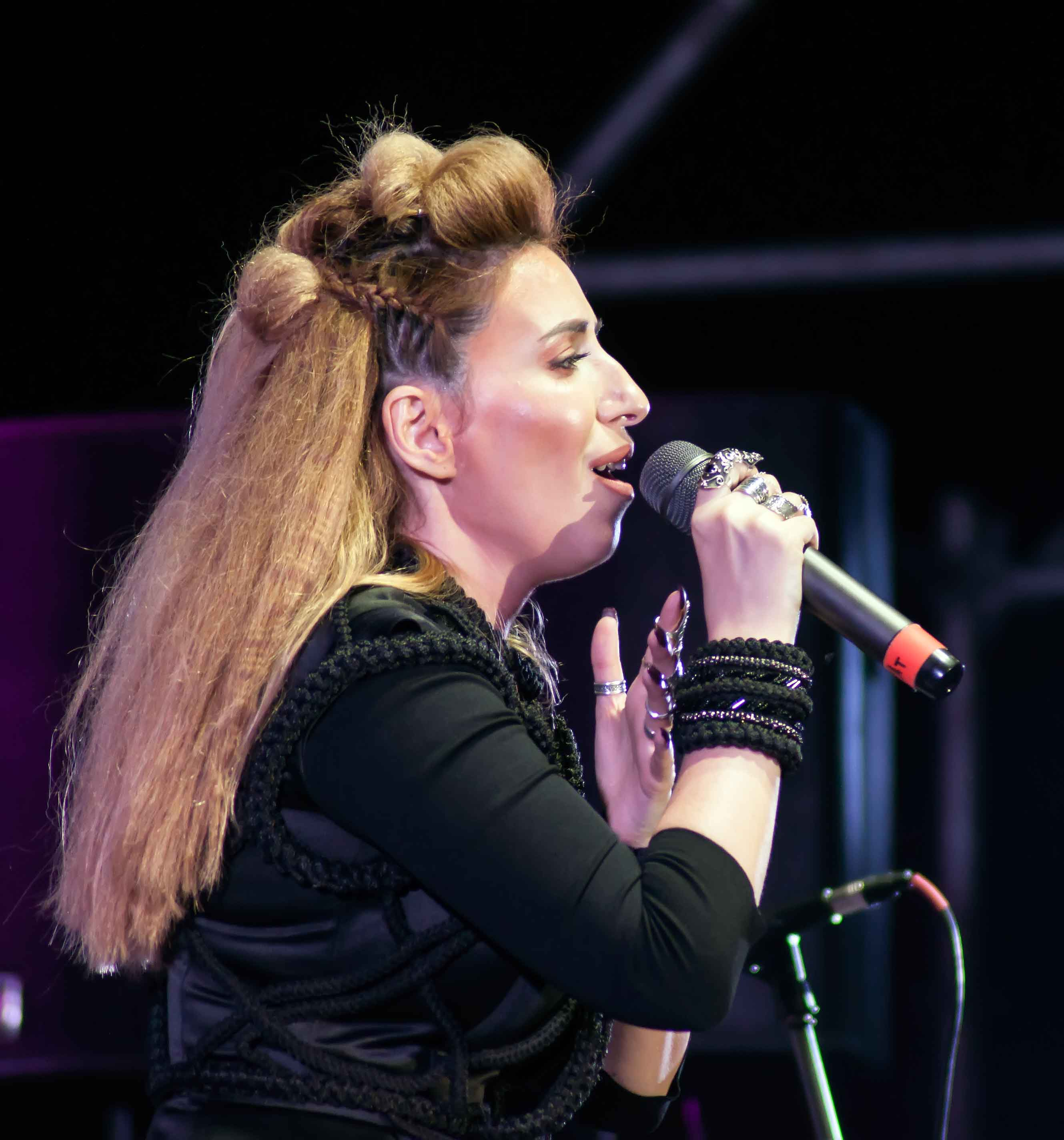 Усадьба Jazz 2017